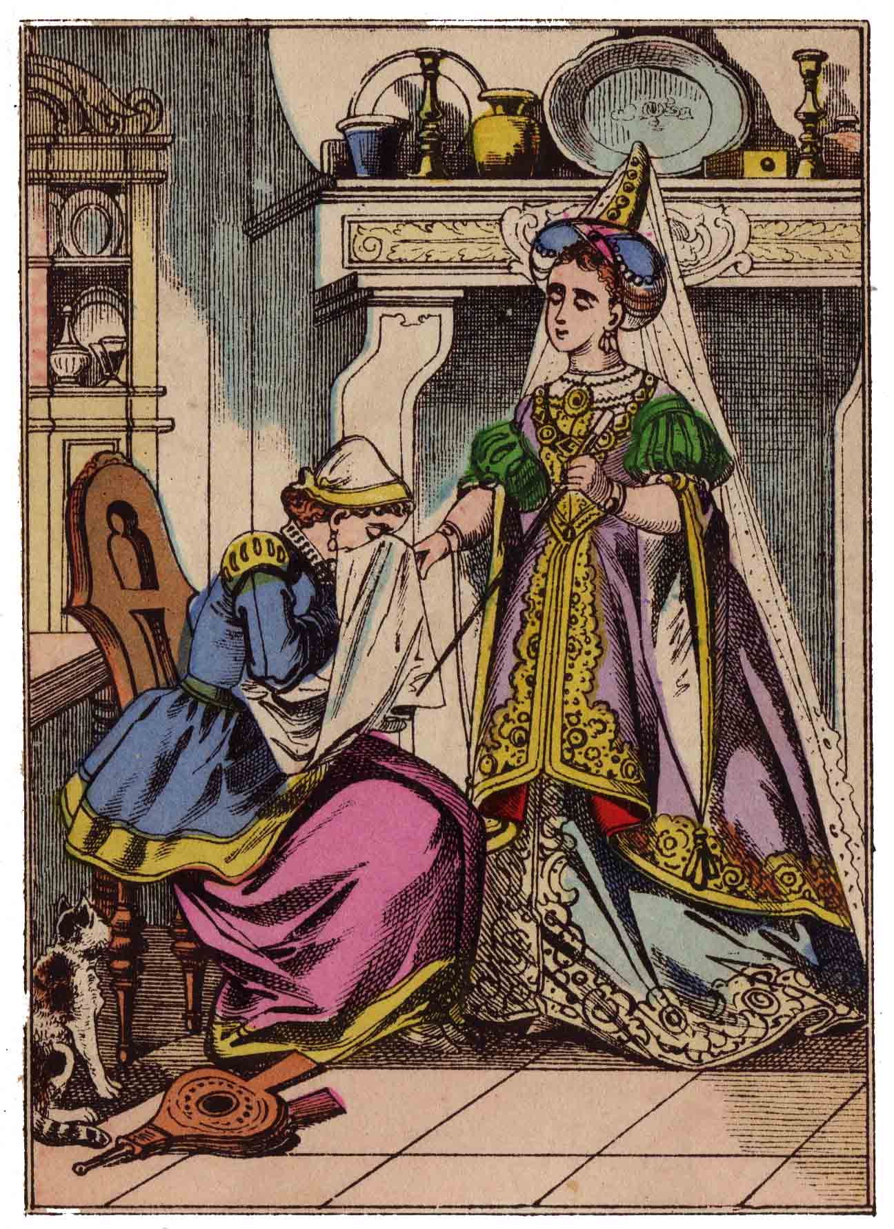 Images d'Épinal : Cendrillon